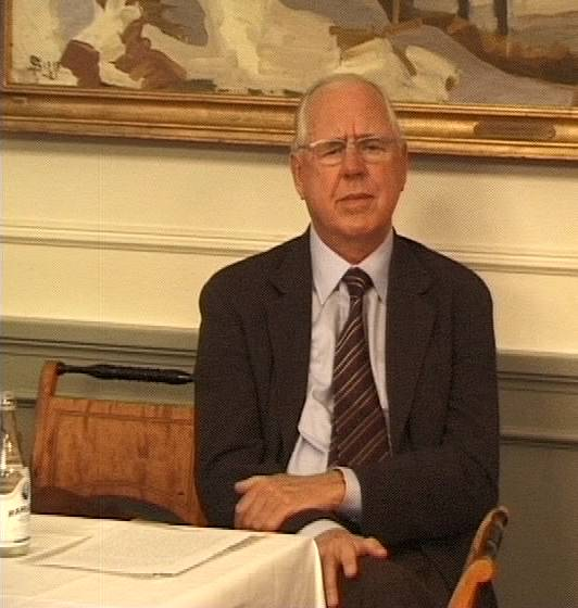 Klaus Rifbjerg. I forbindelse med modtagelsen af Modersmål-Prisen 2001